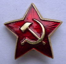 Hoheitsabzeichen der Streitkräfte der UdSSR, hier eine Varianten aus Metall des fünfzackigen Sowjetsterns, der an der Kopfbedeckung der Angehörigen der Roten Arbeiterund Bauernarmee (RA) und der Sowjetarmee (CA) seit den zwanziger Jahren des vorigen Jahrhunderts getragen wurde.